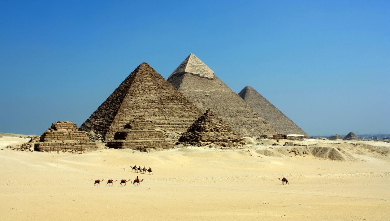 Giza Pyramids - أهرامات الجيزة